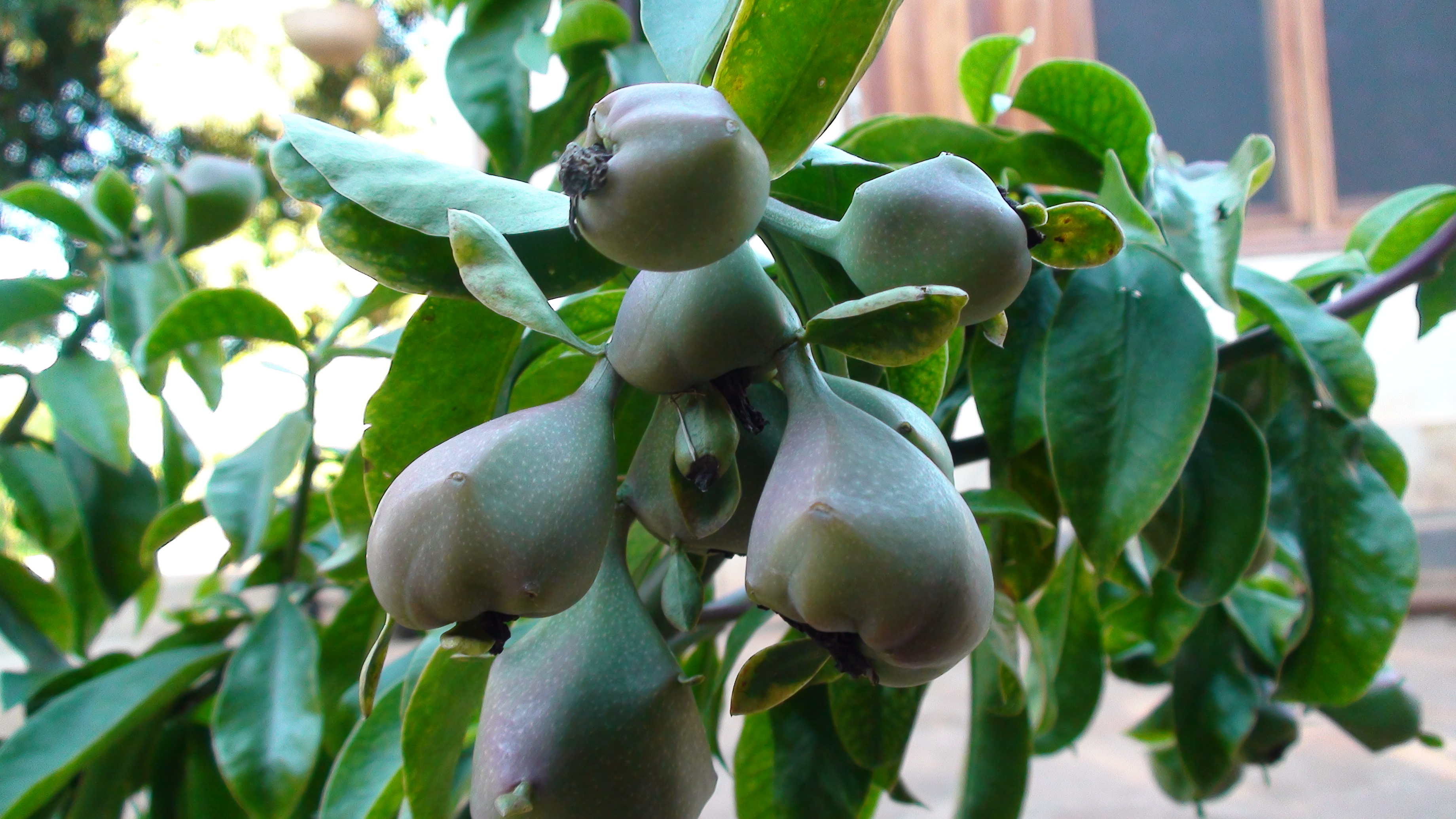 Die Früchte sind in Größe und Form sehr unterschiedlich.